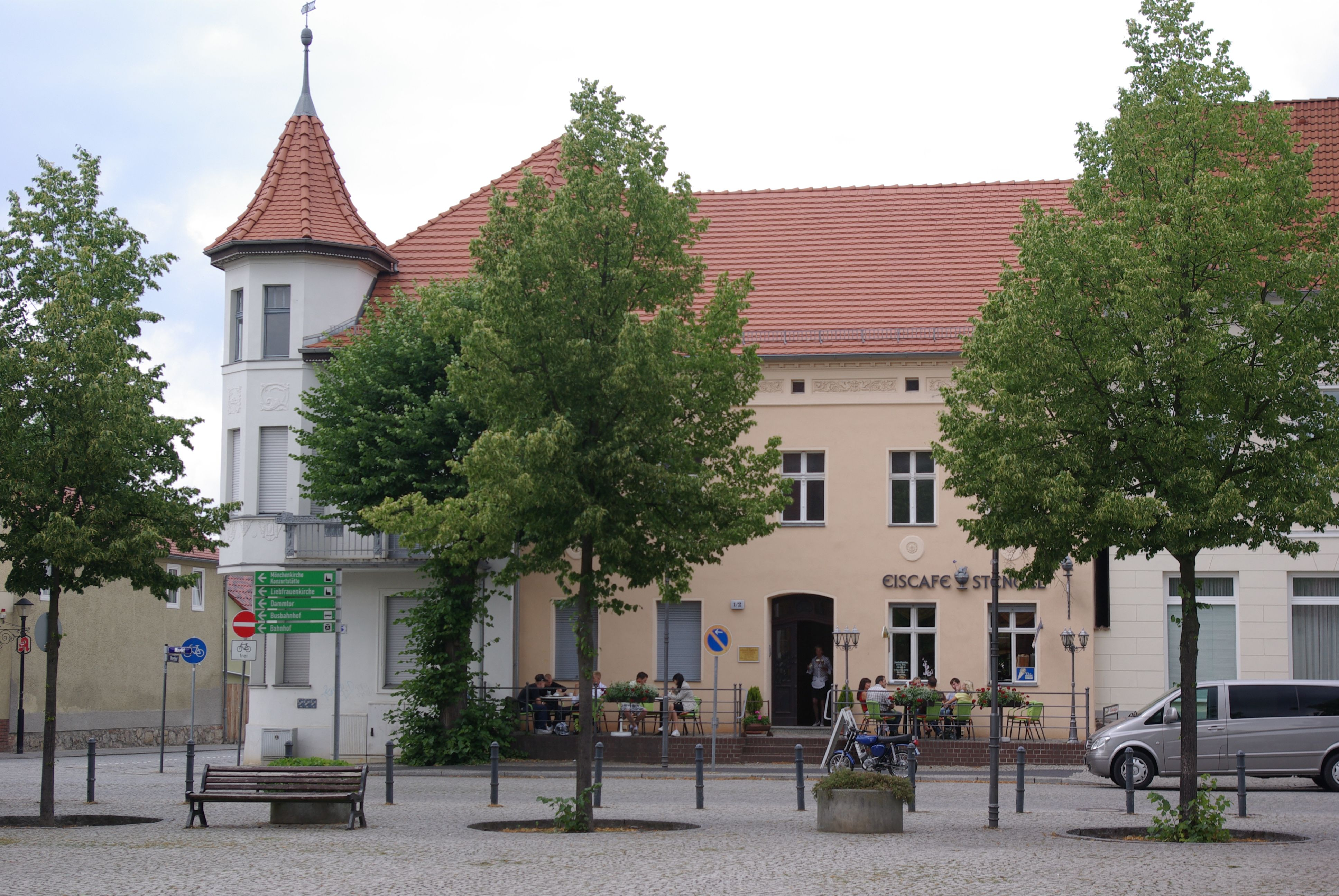 Jüterbog in Brandenburg. Das Wohnhaus und ehemalige Gasthaus Markt 1 steht unter Denkmalschutz. Das Jetzige Haus wurde 1912 erbaut.